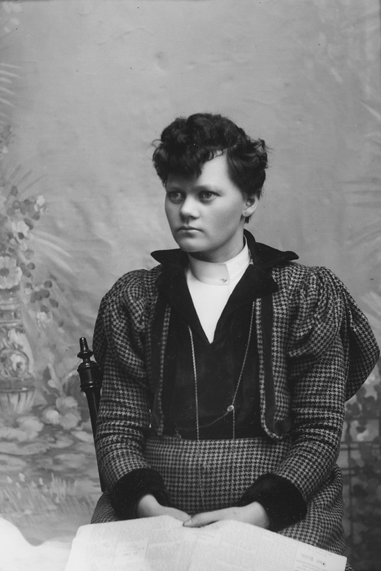 Berg & Høeg Marie Høeg i rutete drakt. ca. 1895-1903. Sølvgelatin på barytt. NMFF.000418-15